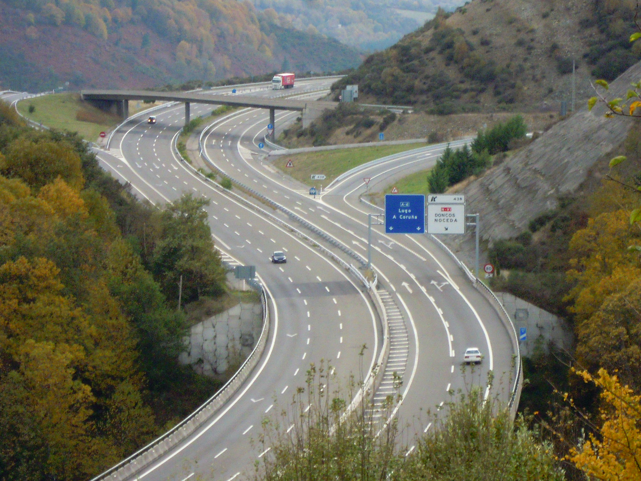 Autovía A-6 ao seu paso por Noceda (As Nogais, provincia de Lugo), á beira do río Navia.